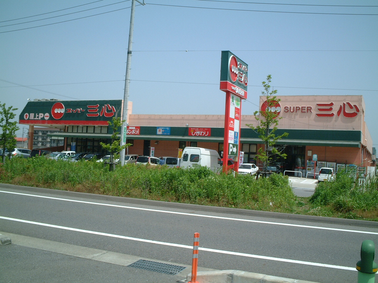 三心常願店の画像